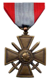 Crois de guerre des TOE